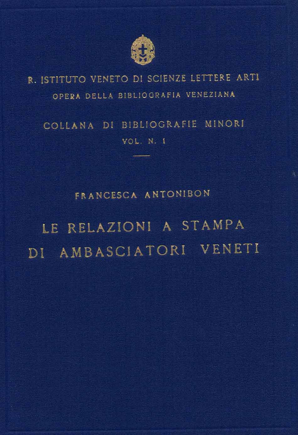 Le relazioni a stampa di ambasciatori veneti / Francesca Antonibon. - Padova : Tipografia del Seminario, 1939. - 152 p. ; 25 cm. - (Collana di bibliografie minori ; 1) .